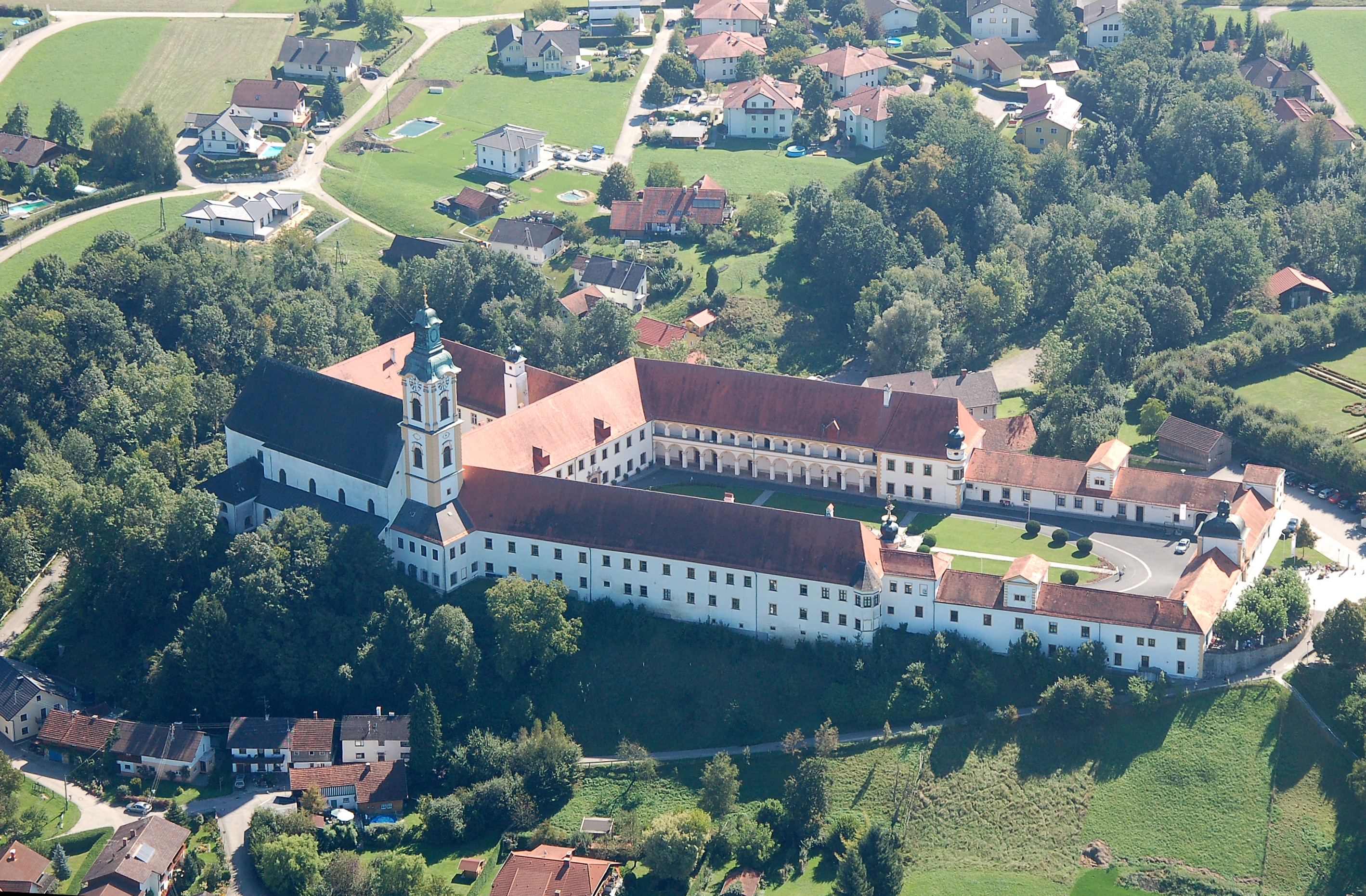 Augustinerchorherrenstift